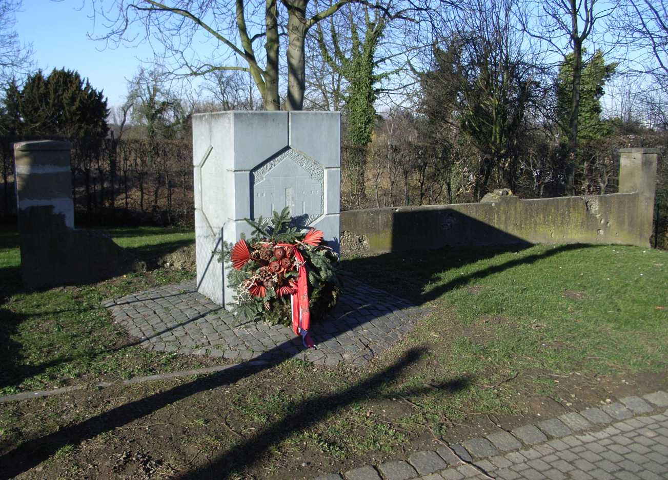 Gedenkstein für die Linnicher Synagoge, Nordpromenade